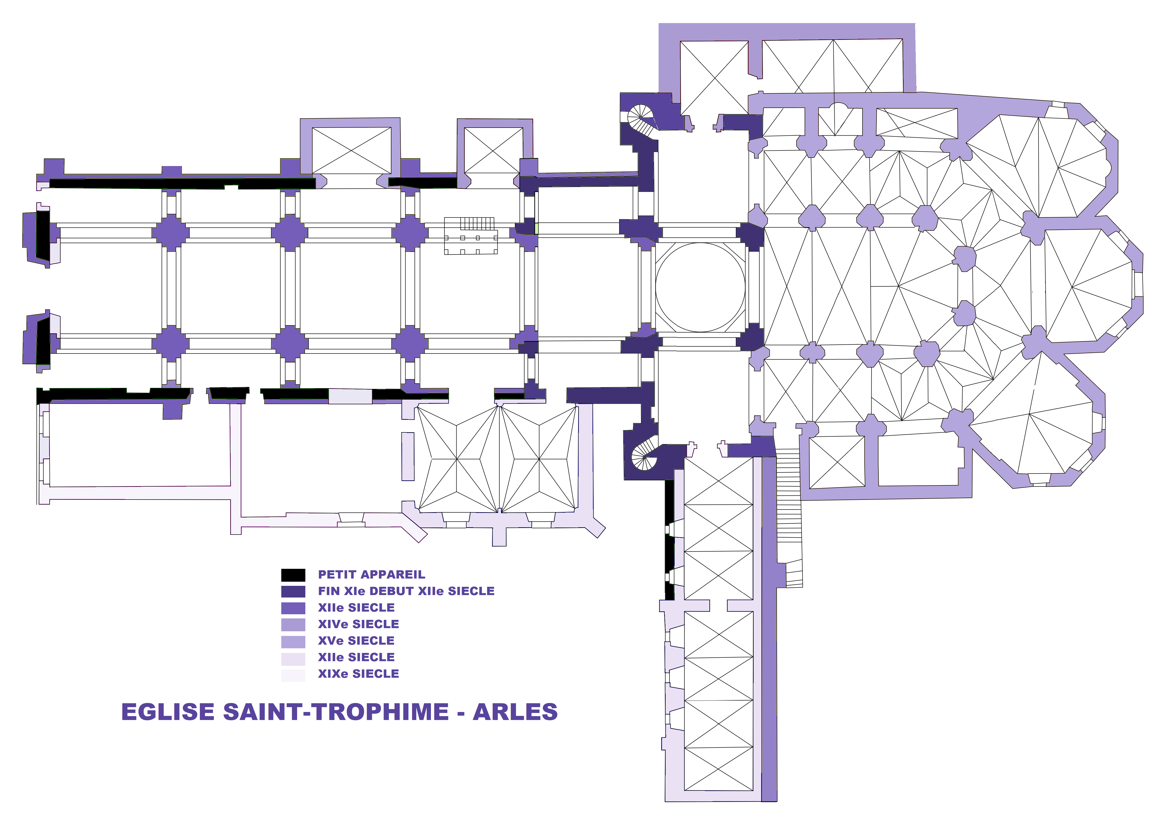 Eglise Saint-Trophime, Arles, Plan (Image Commons modifiée)